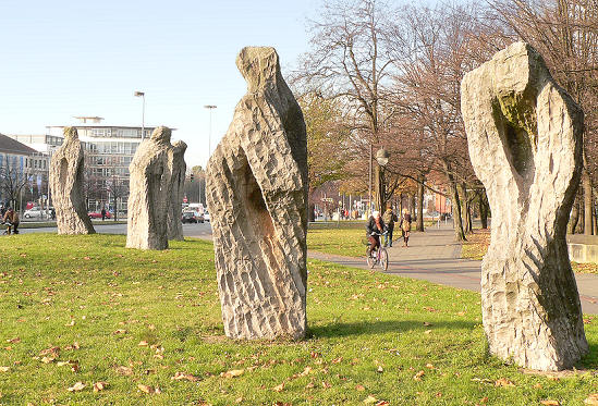 Skulptur Große Familie von Eugene Dodeigne auf der Skulpturenmeile in Hannover Foto aufgenommen von Benutzer Benutzer:Axel Hindemith, Dezember 2005